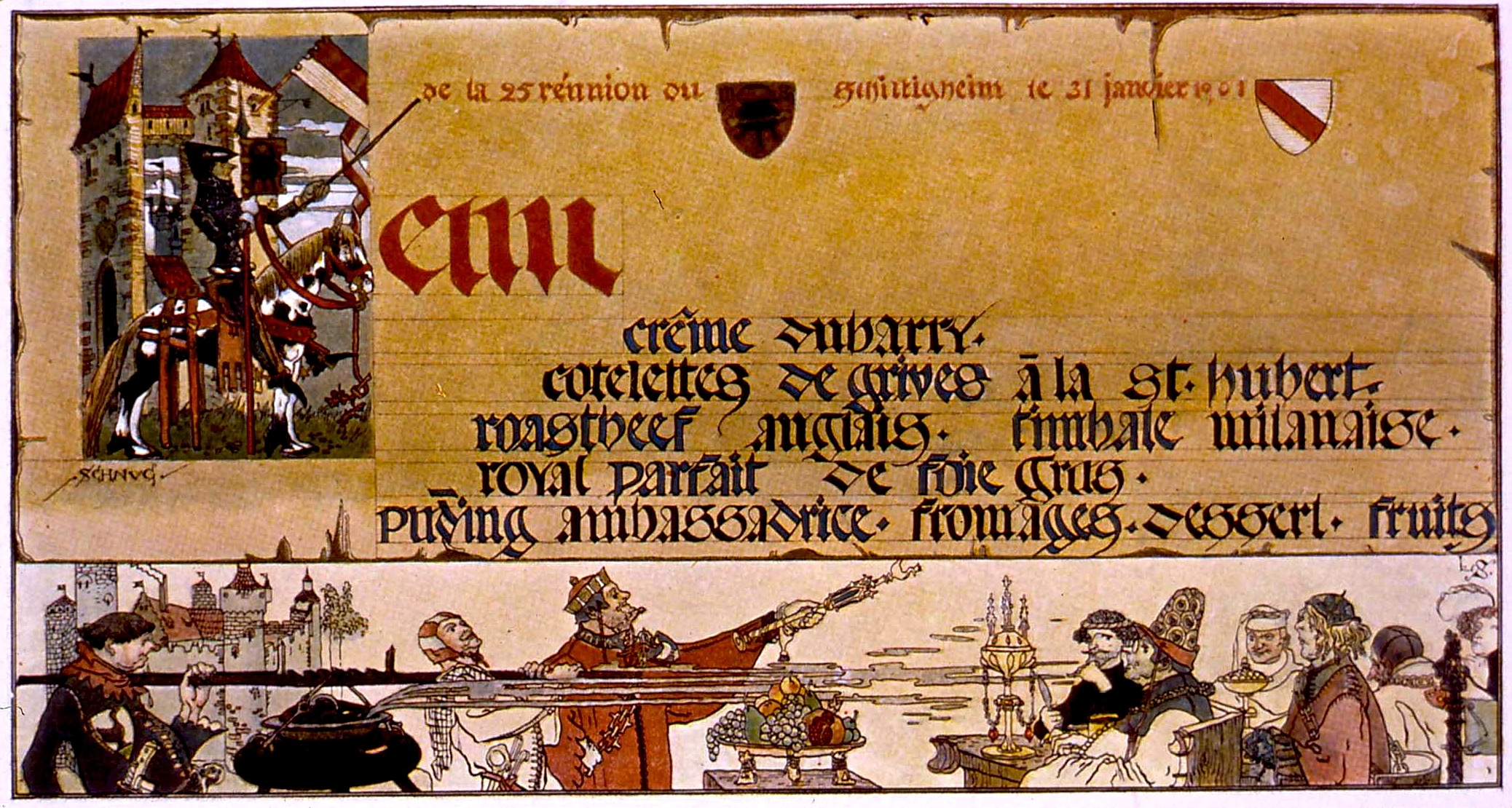 Menu de la 25e Réunion du Kunschthaafe, Schiltigheim le 31 Janvier 1901 Auteur(s) : Schnug, Léo - Geisler, L., graveur Éditeur : Strasbourg : Noiriel J, 1904 In : L'Alsace à table par Adolphe Seyboth. Extr. de : Revue alsacienne illustrée, 6, 1904, 2, (pl. 2); NBI 1.